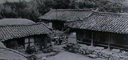 줄포리 김성수, 김연수 생가